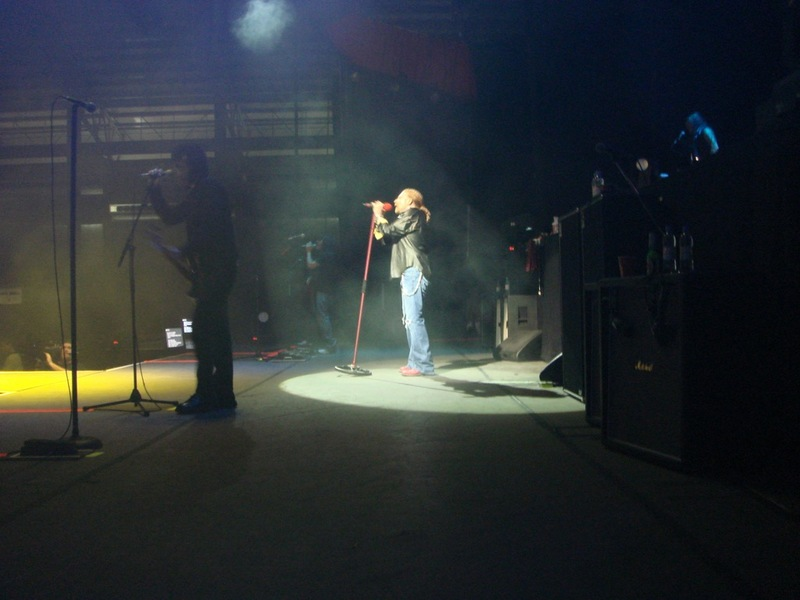 Axl Rose en concierto de guadalajara